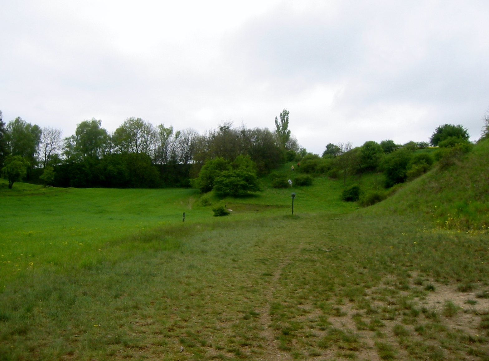 Die Oderhänge Mallnow sind ein 304 Hektar großes Naturschutzgebiet. Mallnow ist ein Ortsteil der Stadt Lebus im Landkreis Märkisch-Oderland in Brandenburg. Das Naturschutzgebiet ist u.a. für die Blüte des Adonisröschens bekannt.